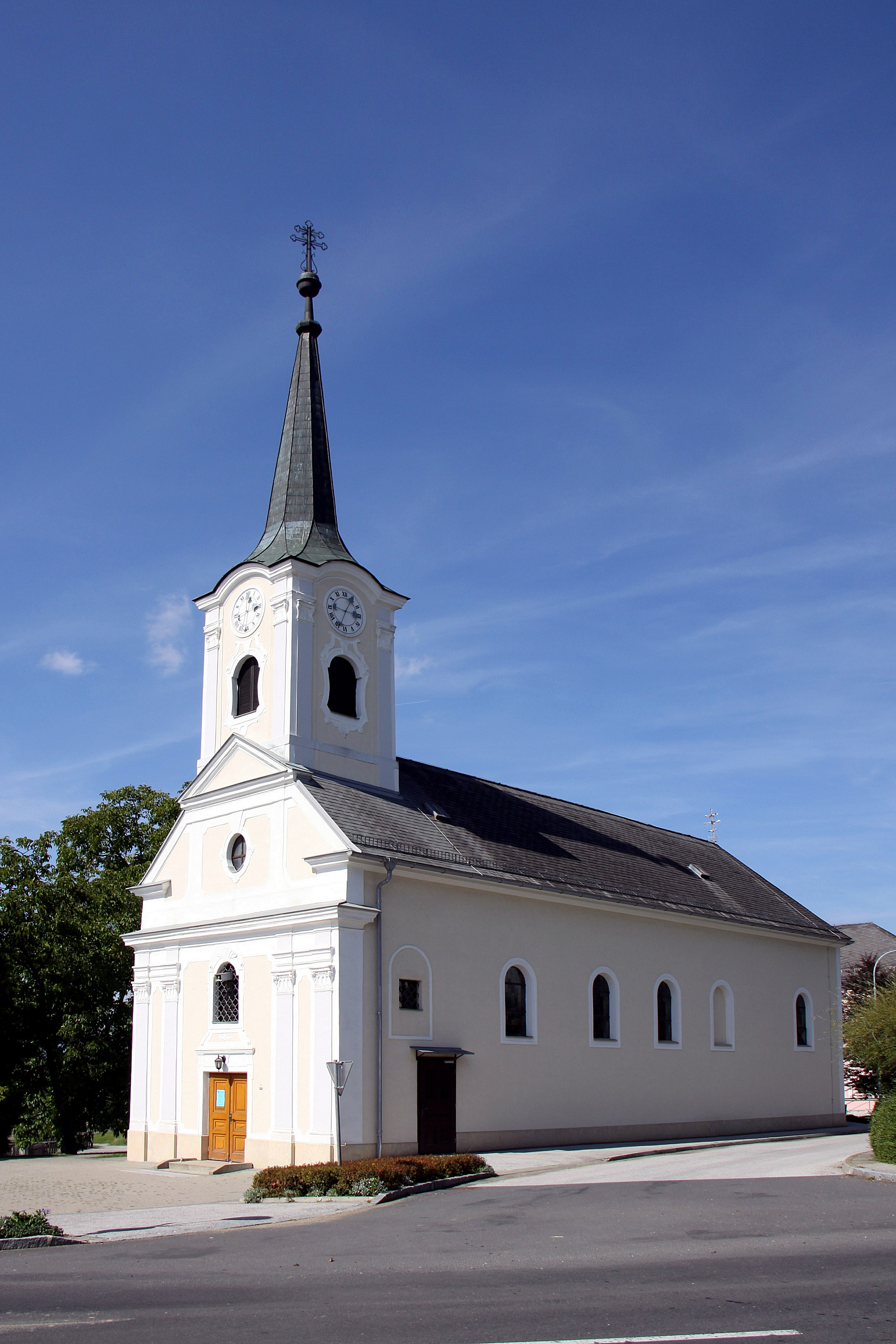 Wolfau - Katholisch Pfarrkirche Hl. Dreifaltigkeit Object location47° 15′ 28.21″ N, 16° 05′ 47.44″ E